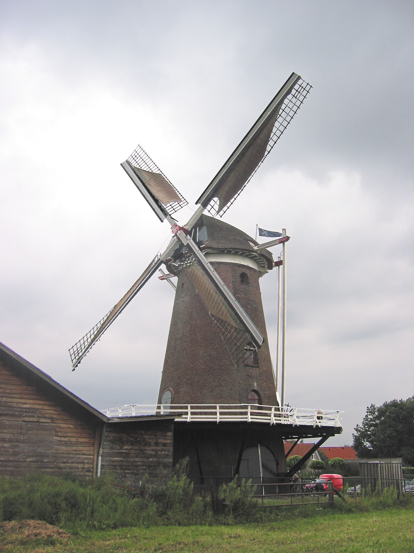 De Hoop in Garderen, lange rust en halve zeilen, Gelderland, the Netherlands